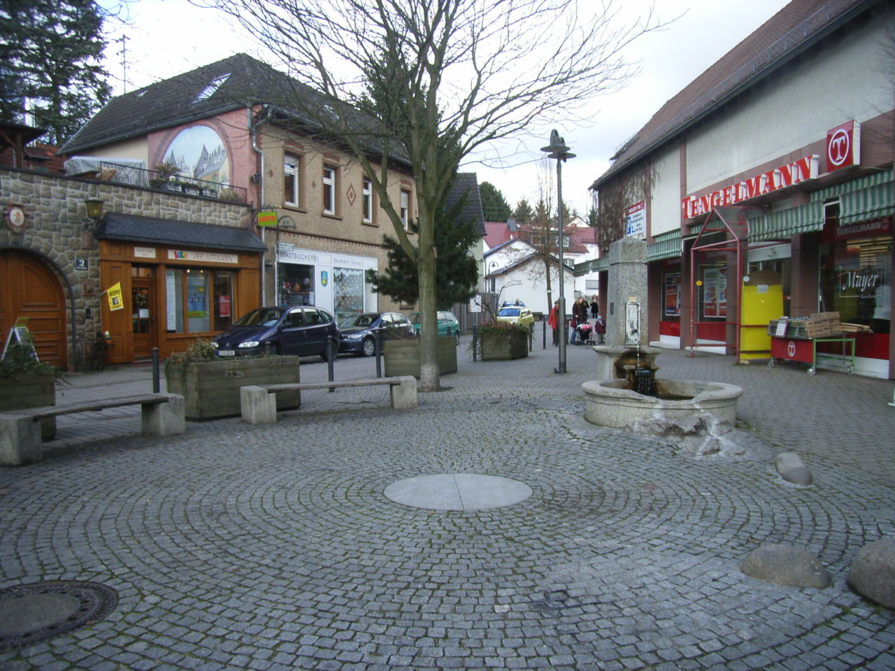 Ansicht des Pijnackerplatzes Steinbach (Taunus)